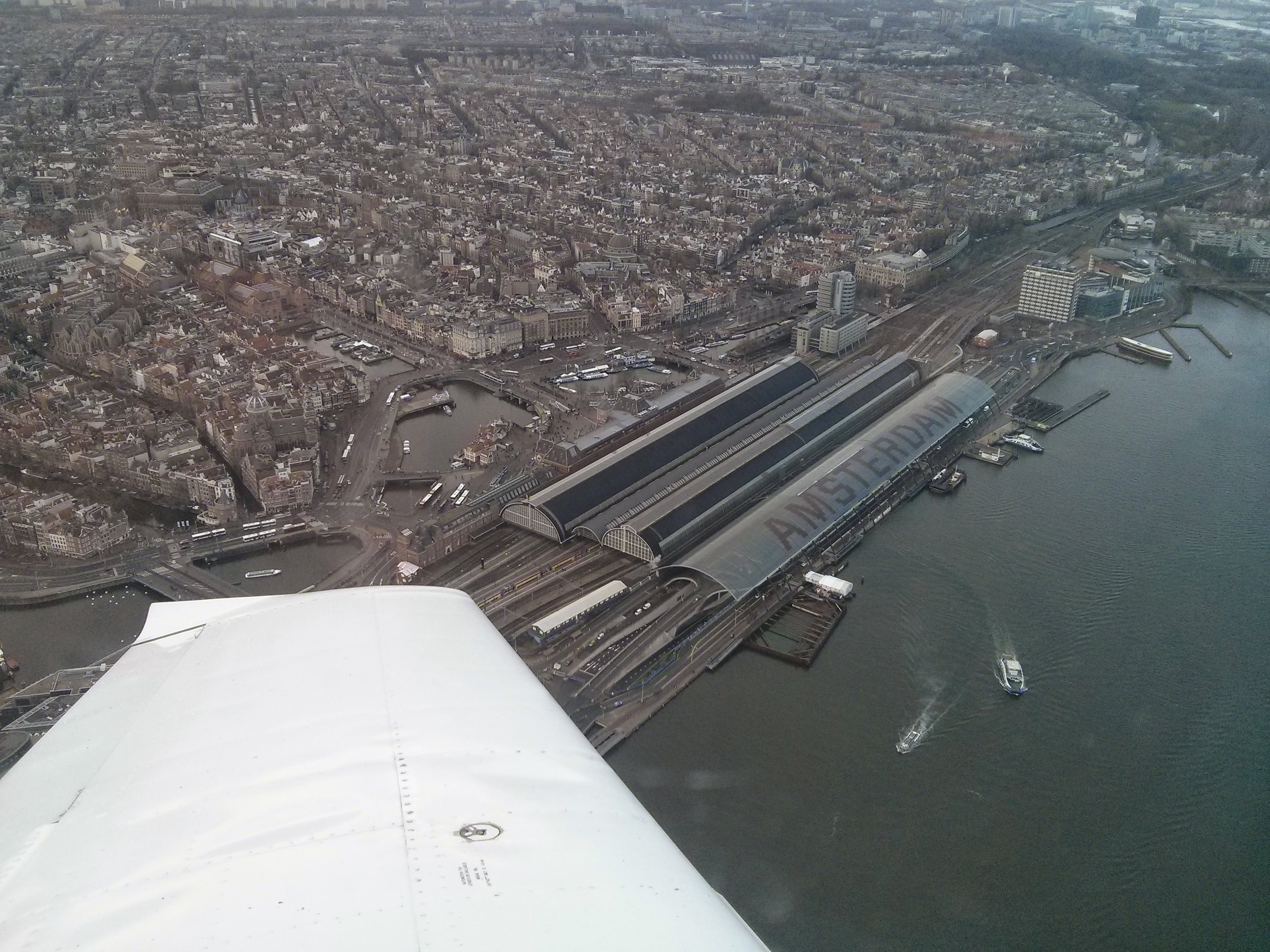 Vista aerea estacion central de Amsterdam